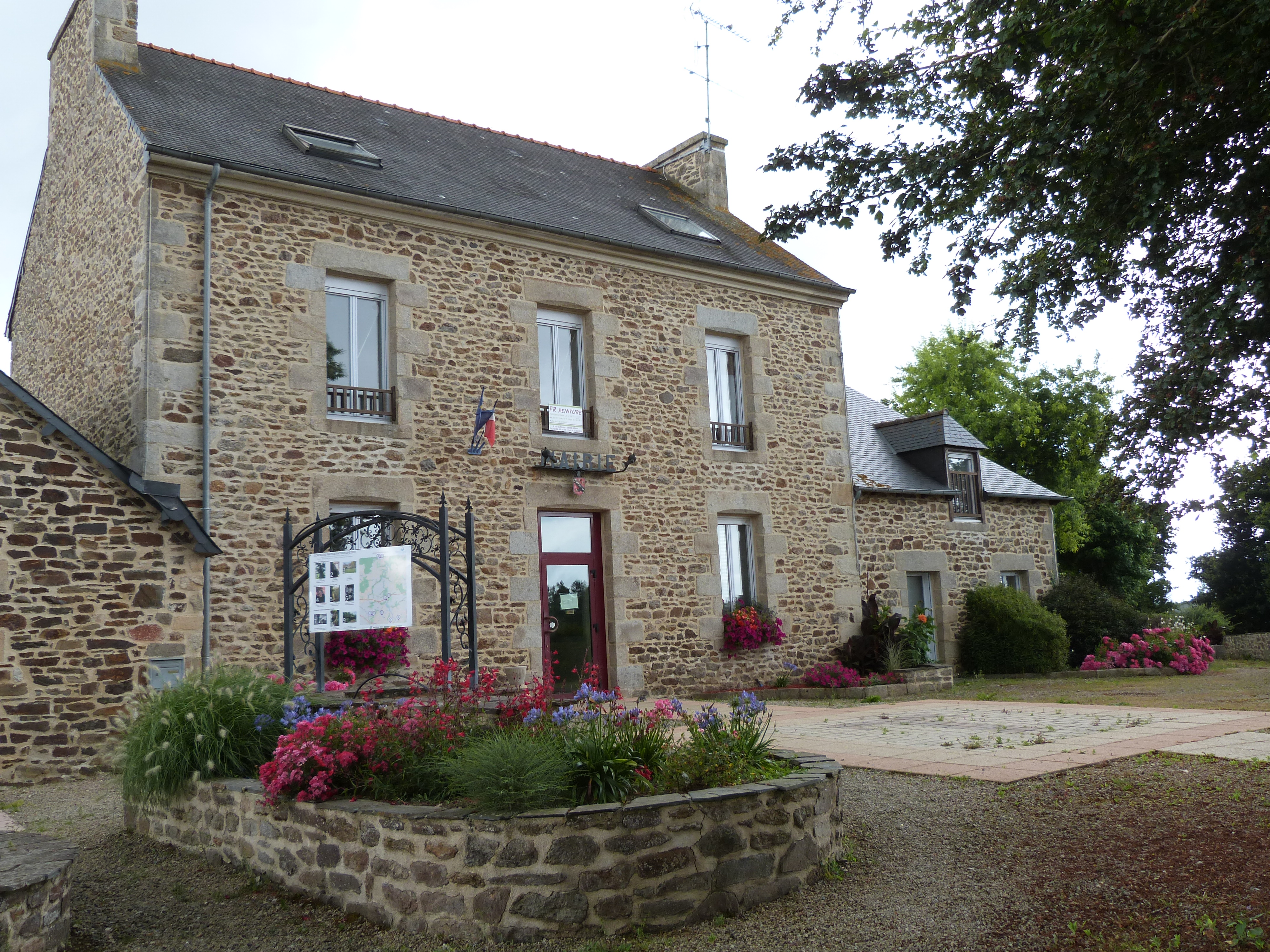 Mairie de Tramain